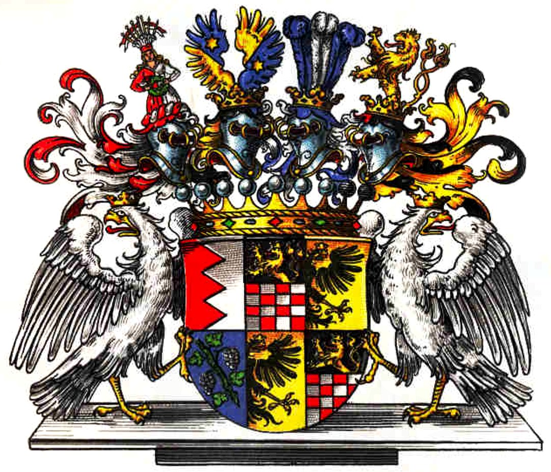 Wappen derer von Zech-Burkersroda